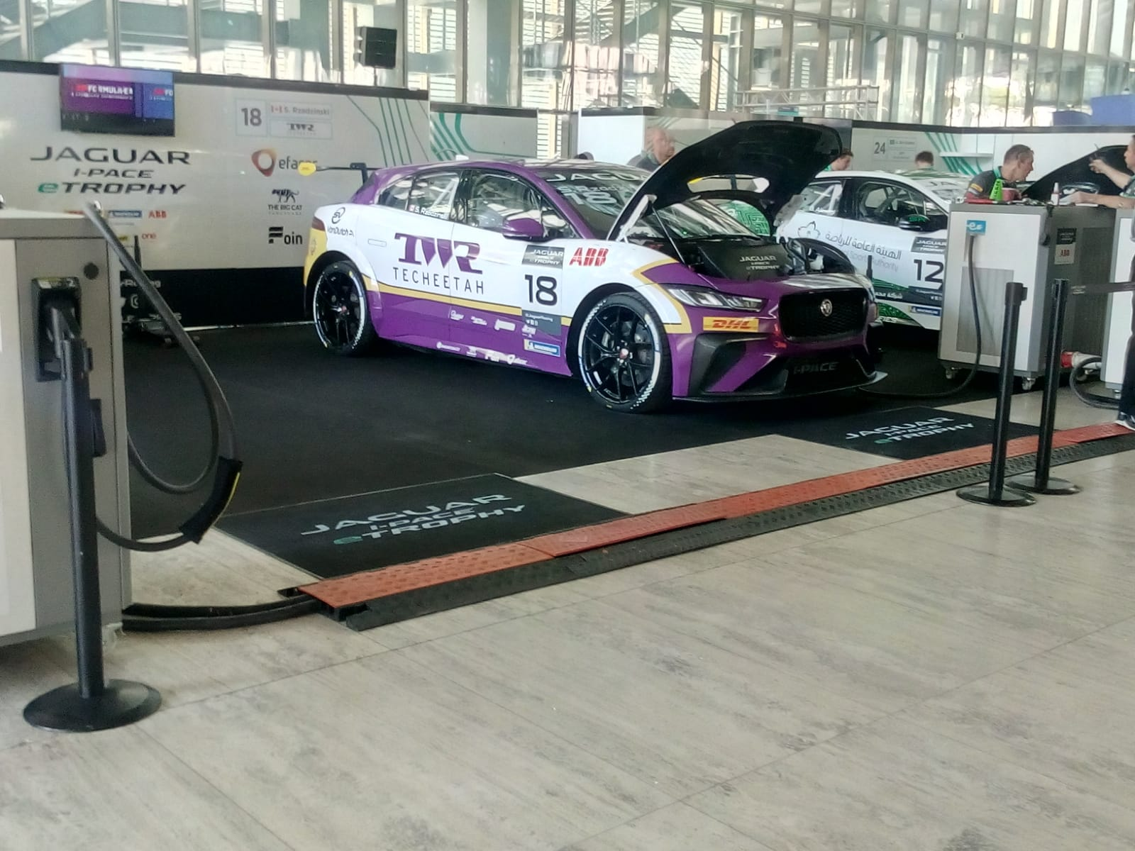 Formula E - Gran Premio di Roma 2019